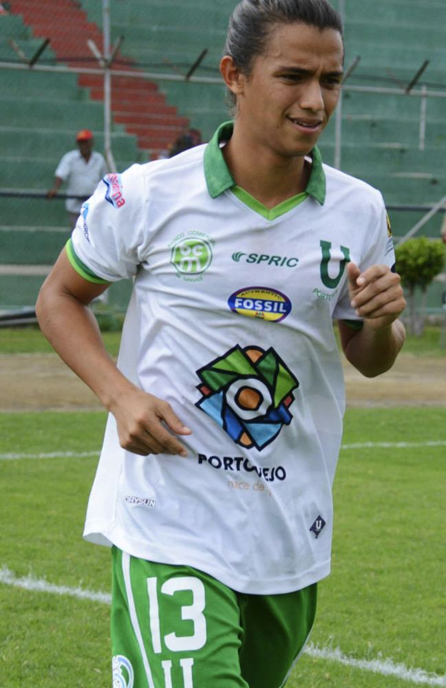 Yohnny Bailón jugando en Liga de Portoviejo en 2015